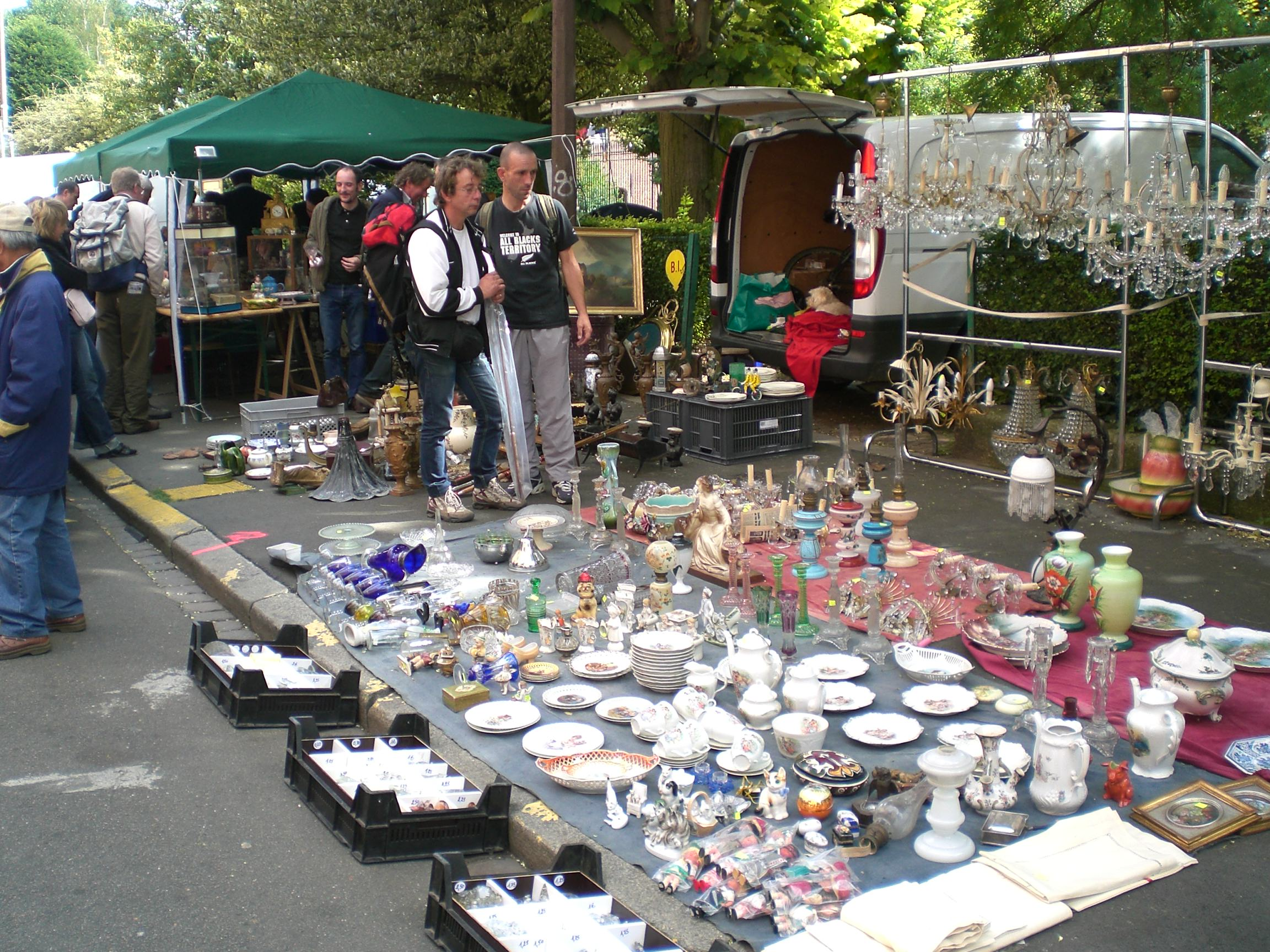 Exposant lors de la Grande Braderie de Lille.